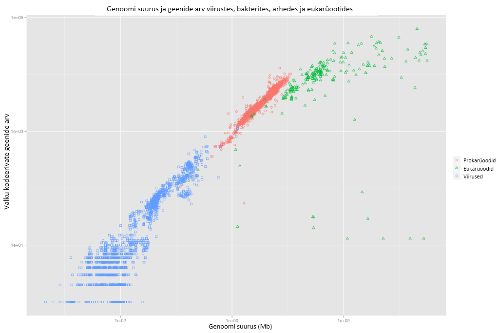 Genoomi suuruse suhe geenide arvuga